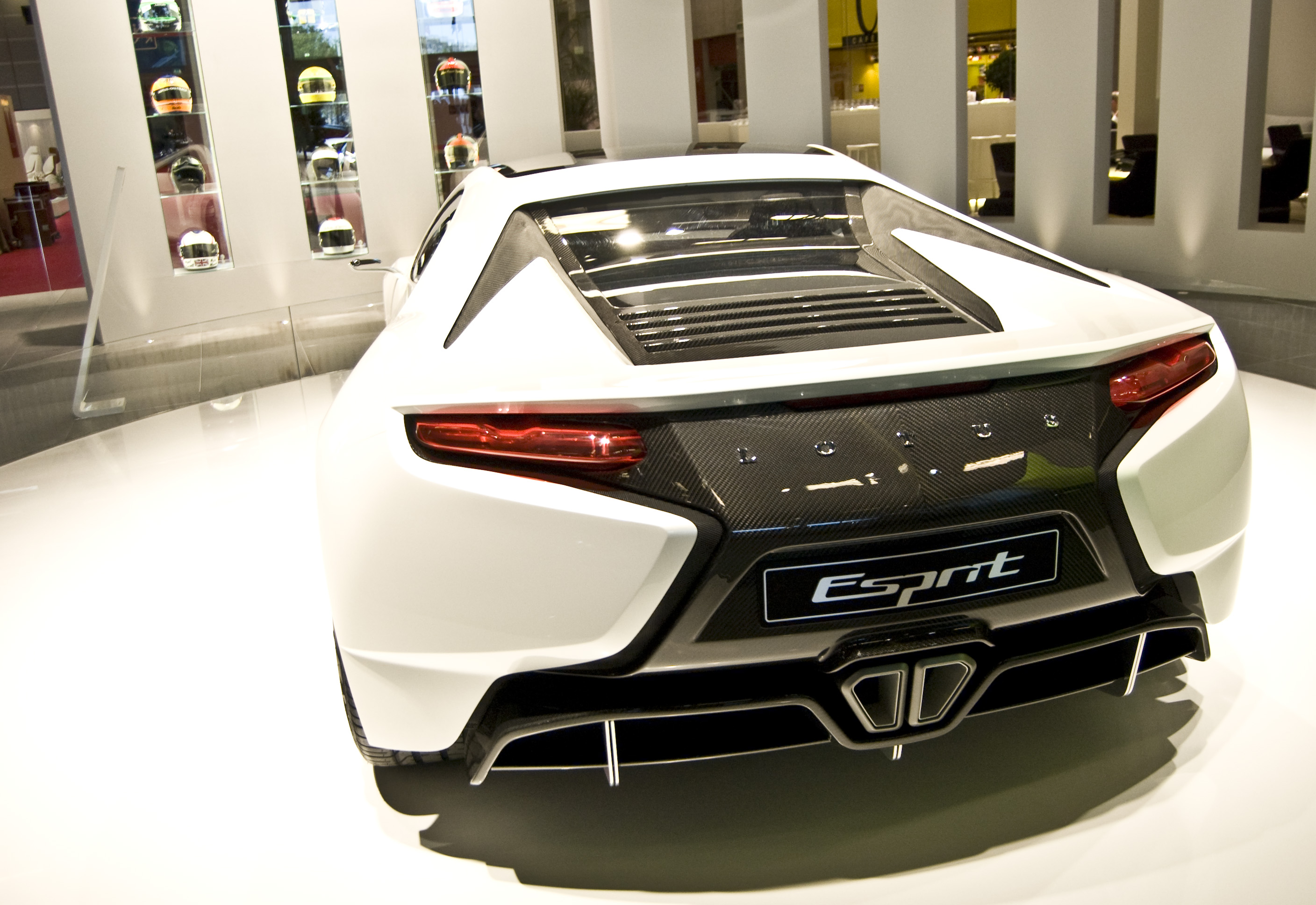 Lotus Esprit Concept en el Salón de París 2010